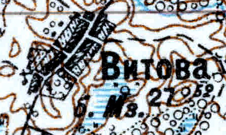 Топографическая карта Ленинградской области, квадрат VIc-28 (Луга), деревня Витово